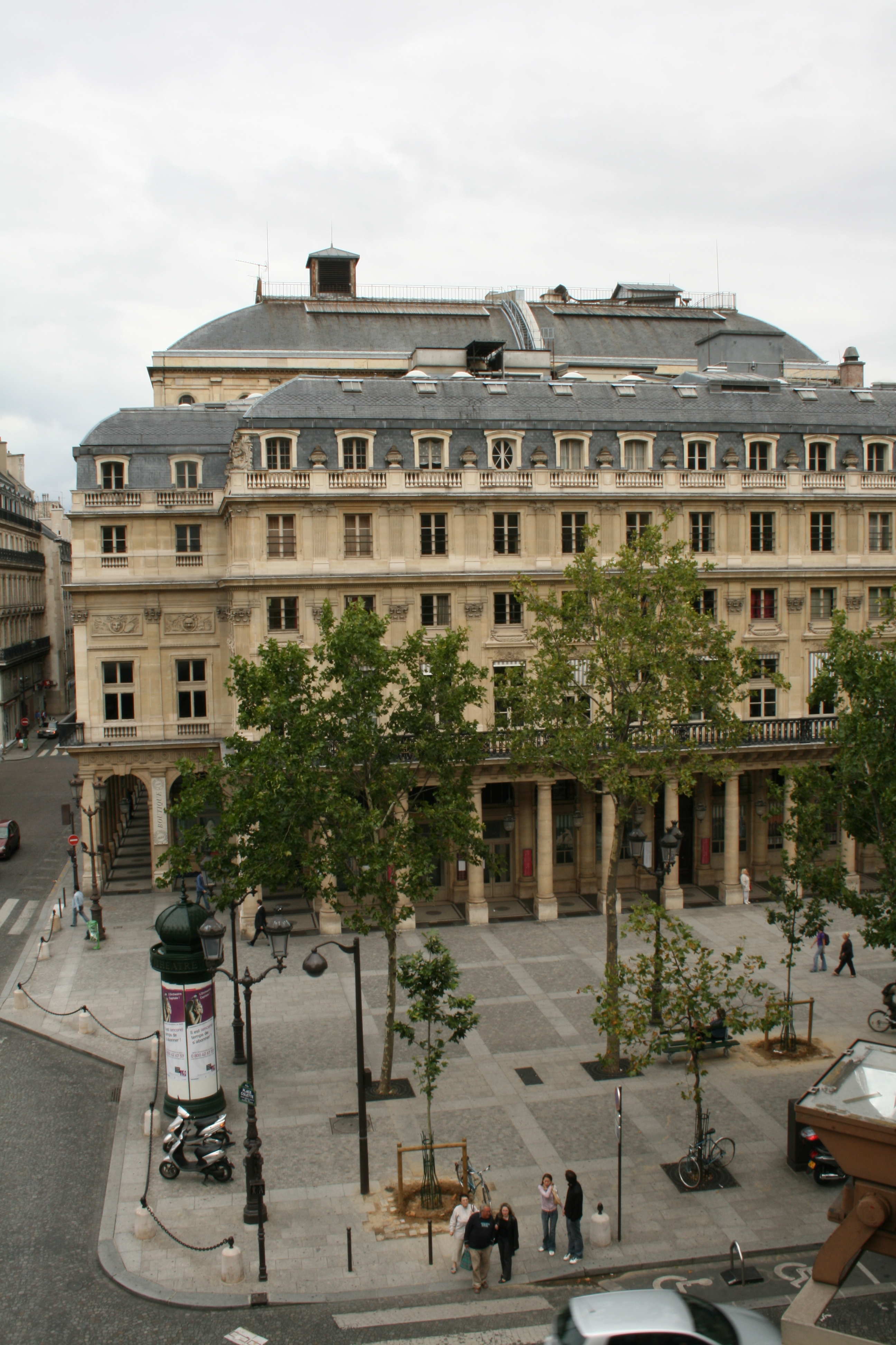 Place Colette, dans le 1er arrondissement de Paris, avec la façade de la Comédie-Française.